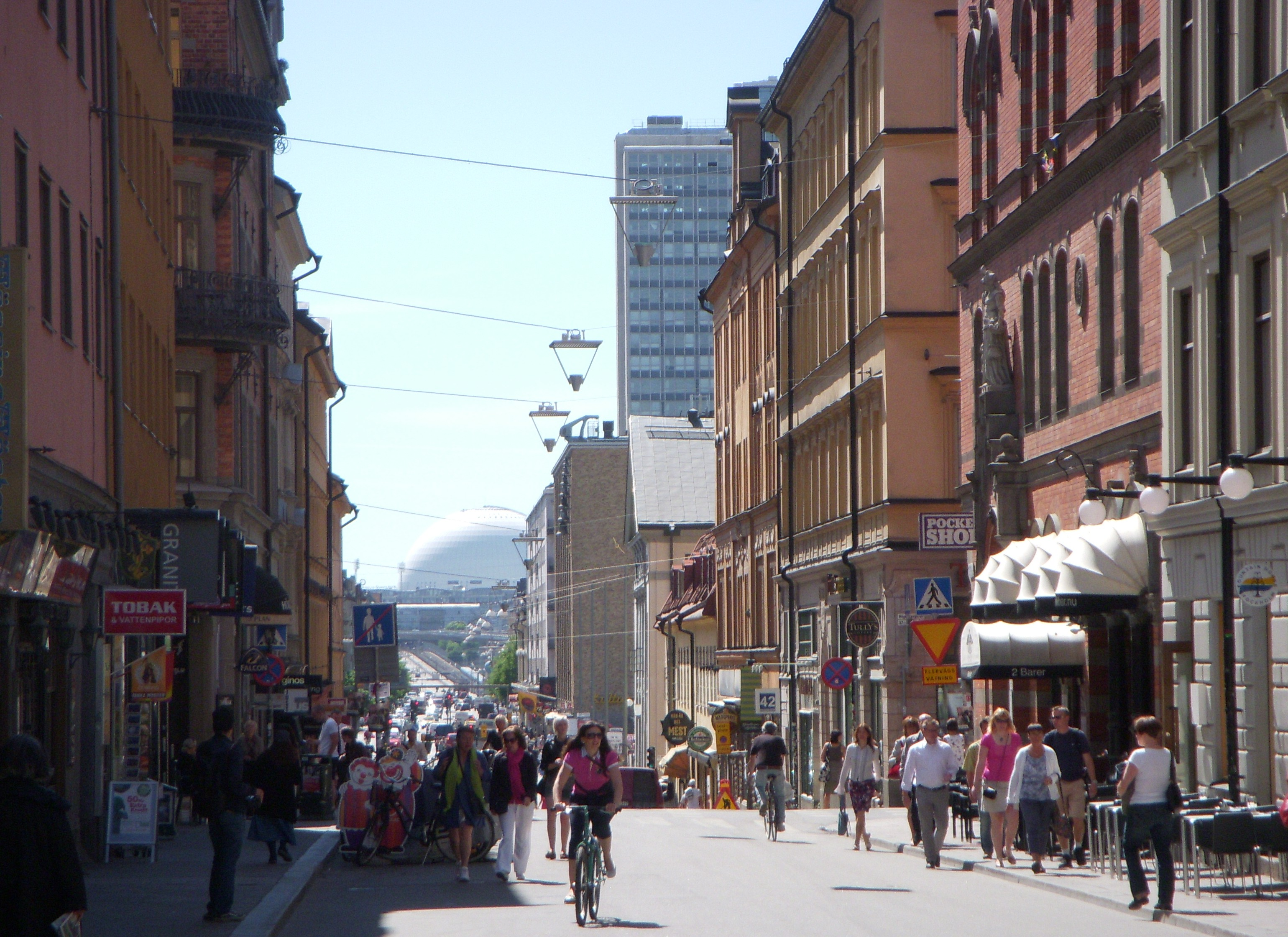 Götgatan söderut från Götgatsbacken